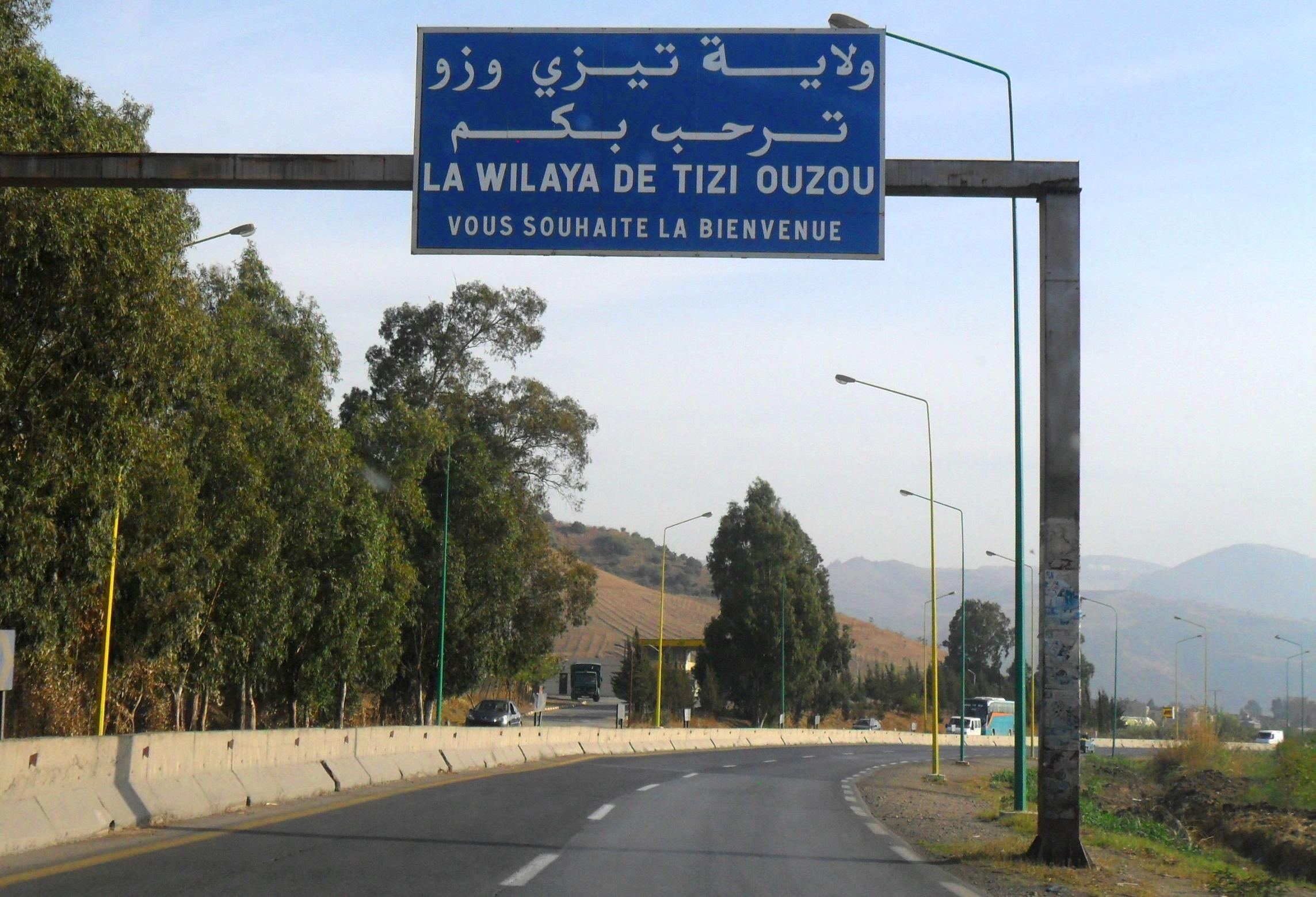 Tizi 1